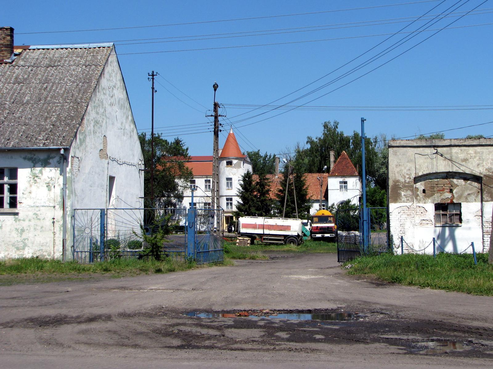 Wojcieszyce. Brama dawnego folwarku.